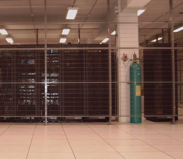 bouteille FM200 dans un datacenter à marseille